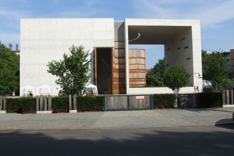 Die neue Kirche St. Canisius in Berlin-Charlottenburg Fotograf: Harald Rossa Datum: Juni 2006